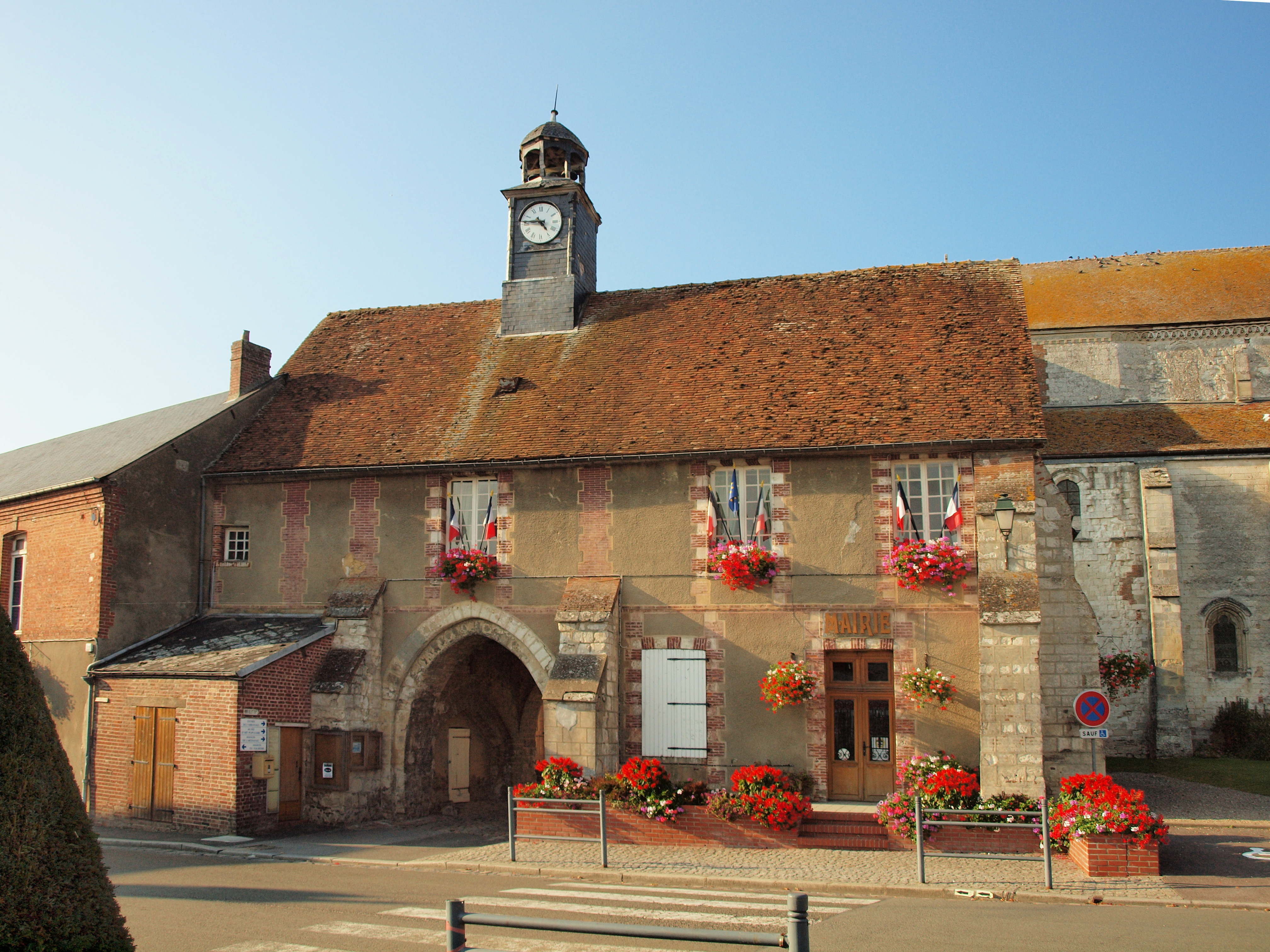 Saint-Germer-de-Fly (Oise, France)